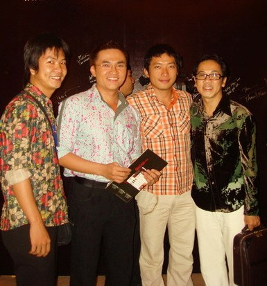 Thành Lộc